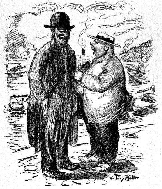 « Ambition irréalisable » par Valéry Müller, in La Caricature n°1129, du 18 juillet 1903. - Voyons, vous, Lallumette, si vous étiez le miniss' de la marine, qu'est-ce que vous feriez ? - Moi ?? C'te malice ! J'commencerais par flanquer Pelletan à l'eau... Après on verrait !!.